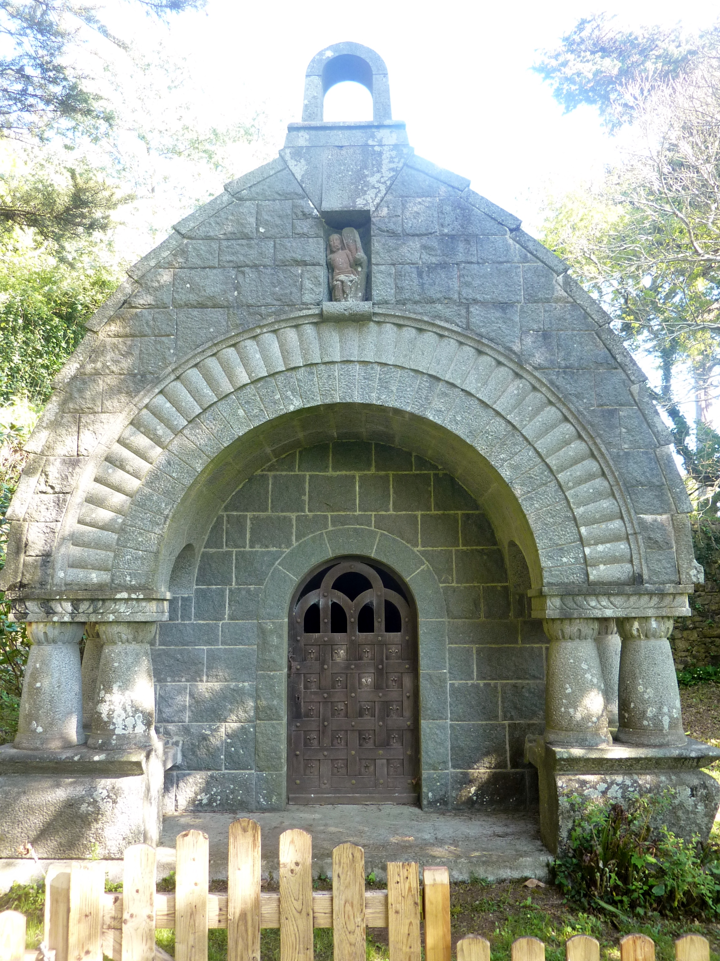 Île Tristan : la chapelle des aviateurs (dénommée ainsi en l'honneur de l'aviateur Dieudonné Costes, ami de Jacques Richepin ; de style néobreton ; construite en 1930 en granite gris de Lanhélin par l'architecte James Bouillé, qui faisait partie du mouvement des Seiz Beur et devenue caveau familial de la famille Richepin)